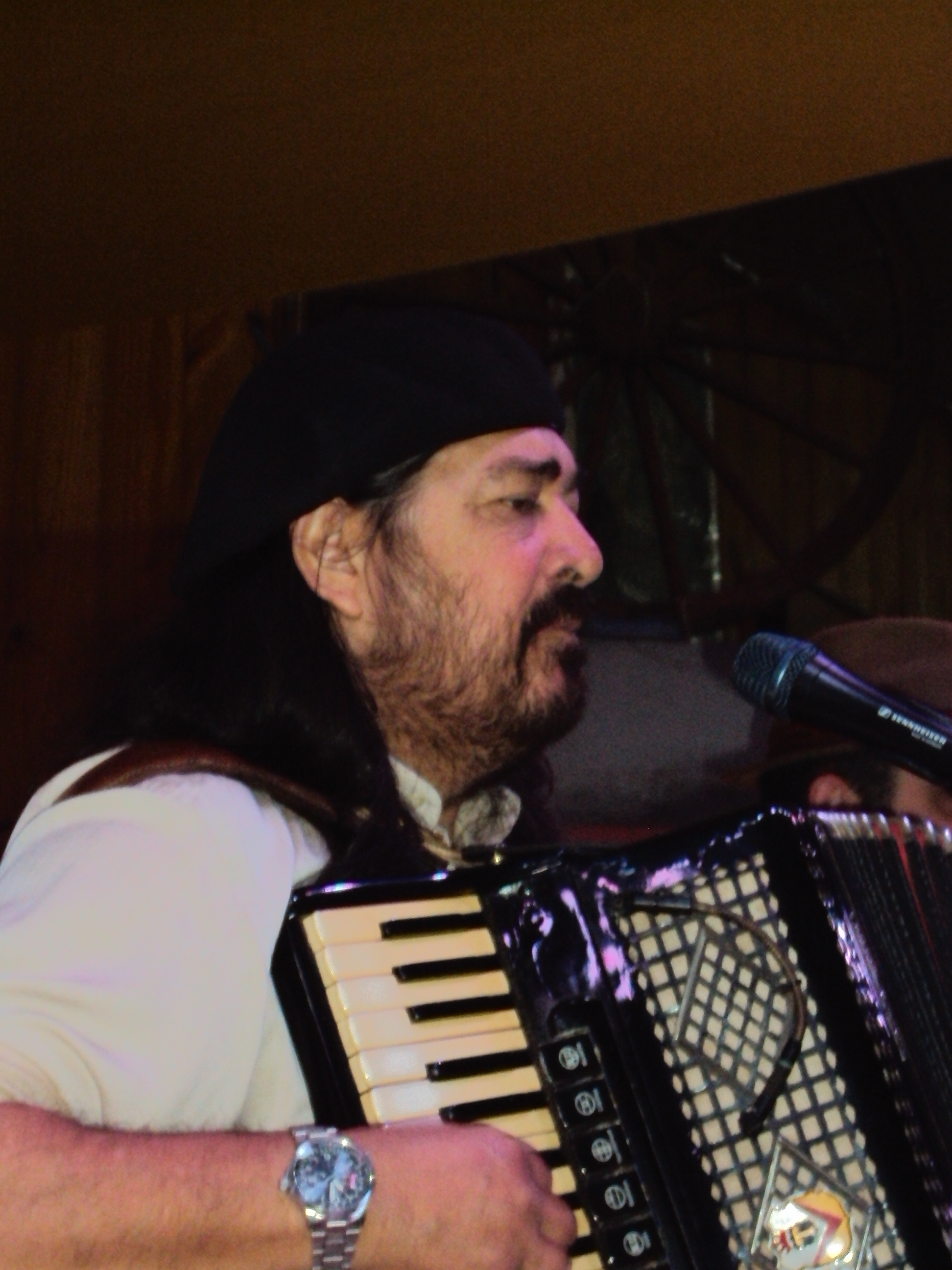 Porca Veia no CTG Galpão Campeiro em Erechim, em 18 de agosto de 2012